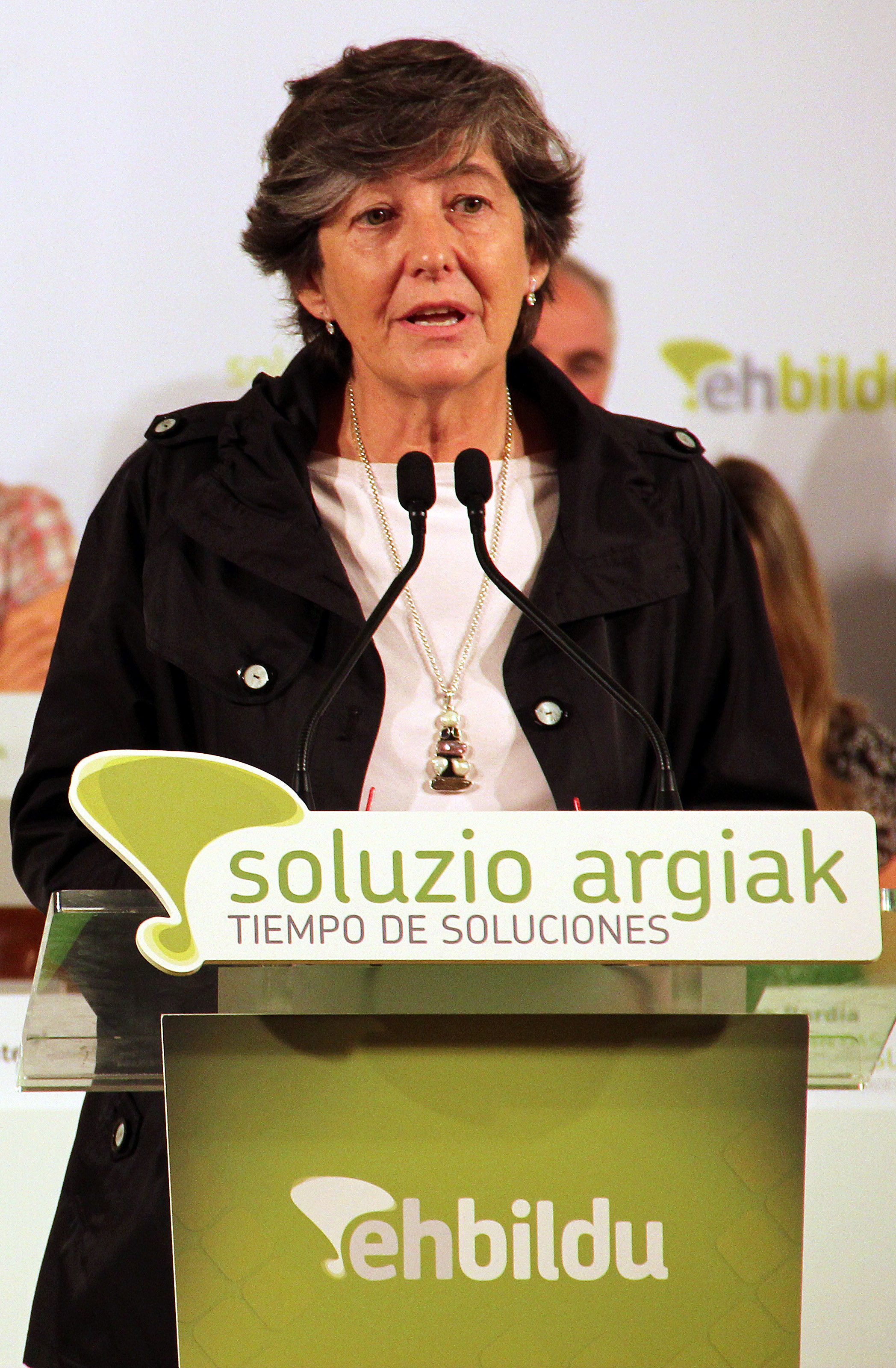 Laura Mintegi en una reunión de EH Bildu en el hotel Carlton de Bilbao, sede del primer Ejecutivo vasco en 1936 y 1937, el 2 de noviembre de 2012, durante la campaña de las autonómicas vascas